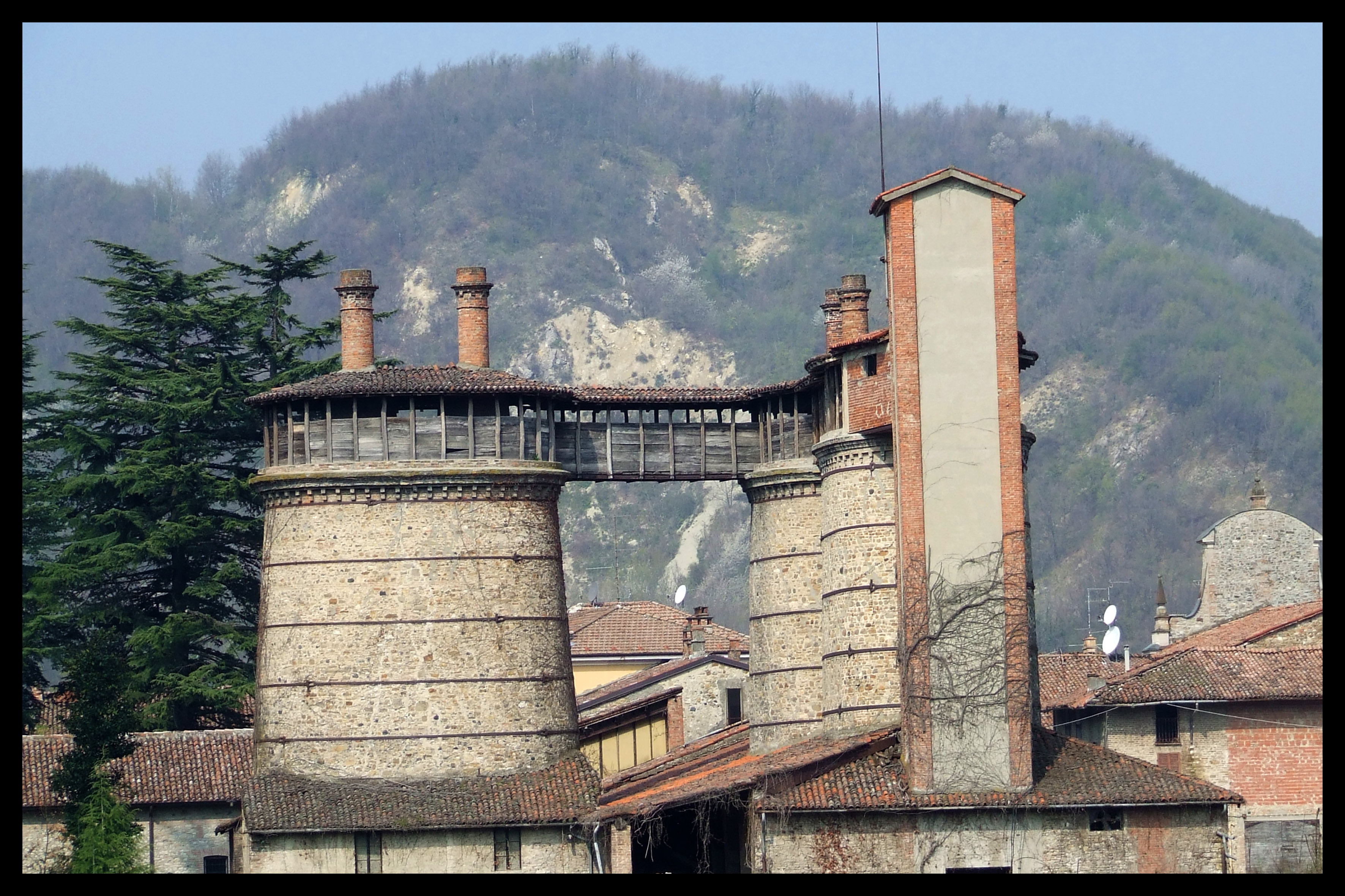 Fornaci di calce Cementirossi This is a photo of a monument which is part of cultural heritage of Italy.